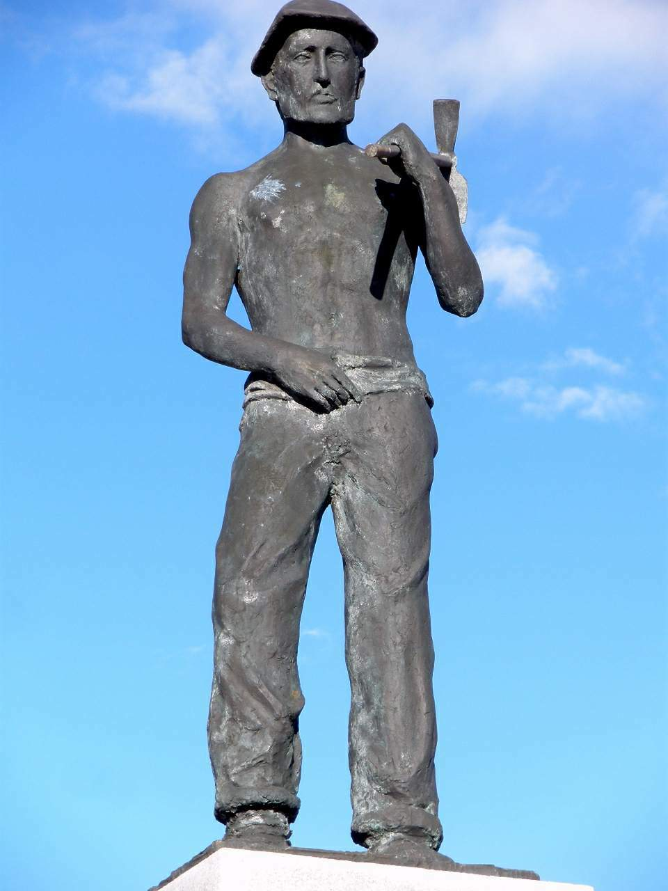 Santa María del Páramo (León)